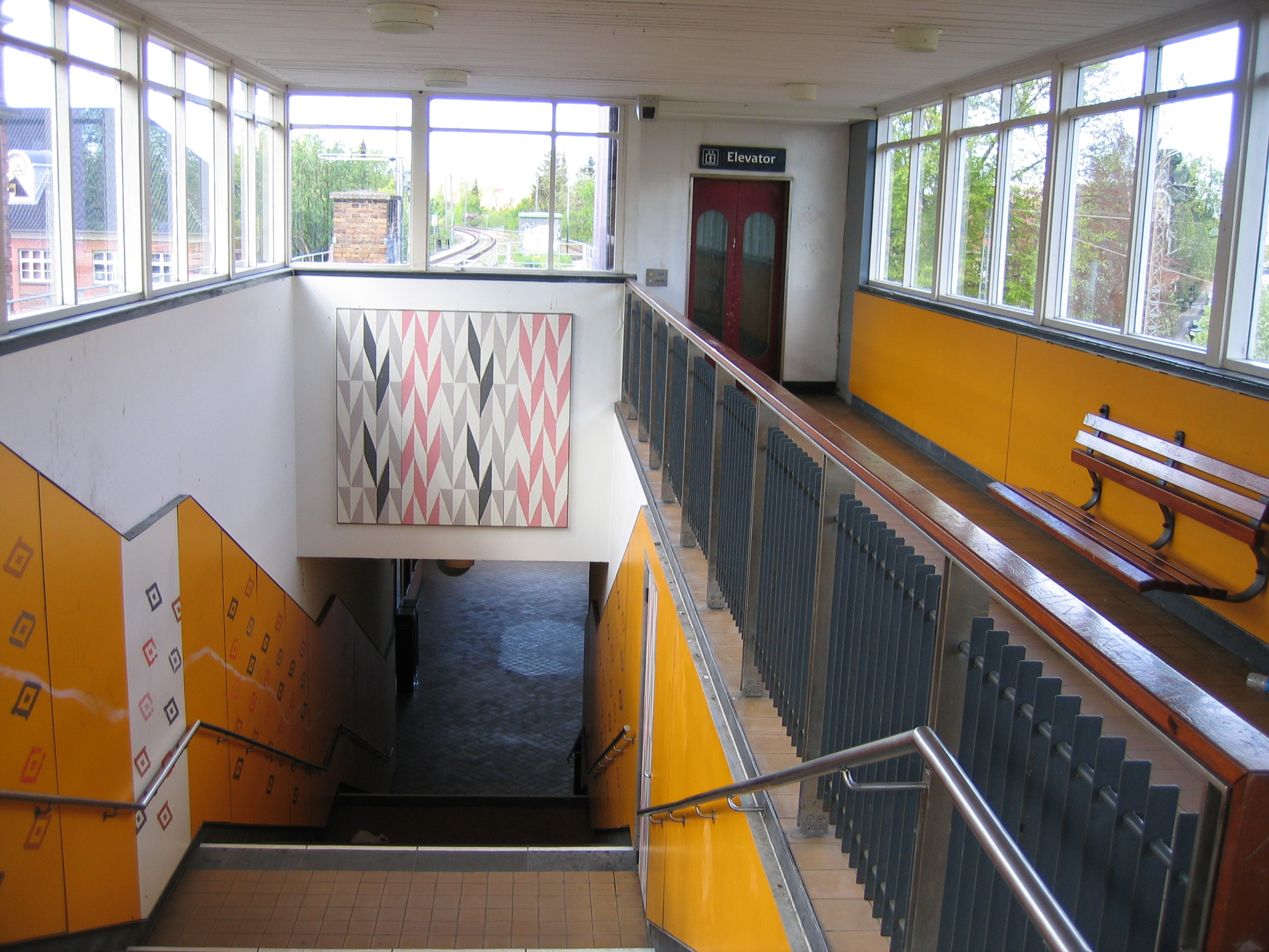 Peter Bangs Vej Station on Frederiksberg, Denmark